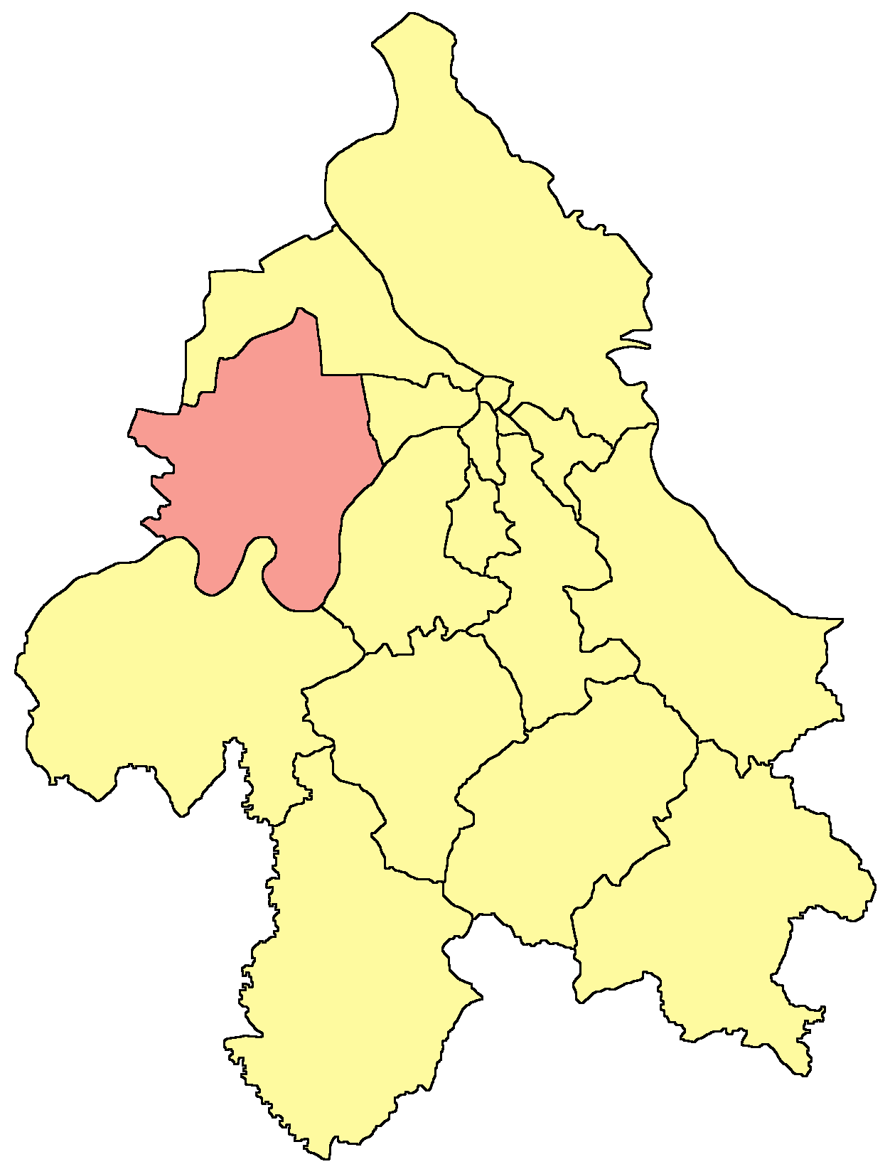 Belgrade municipality map